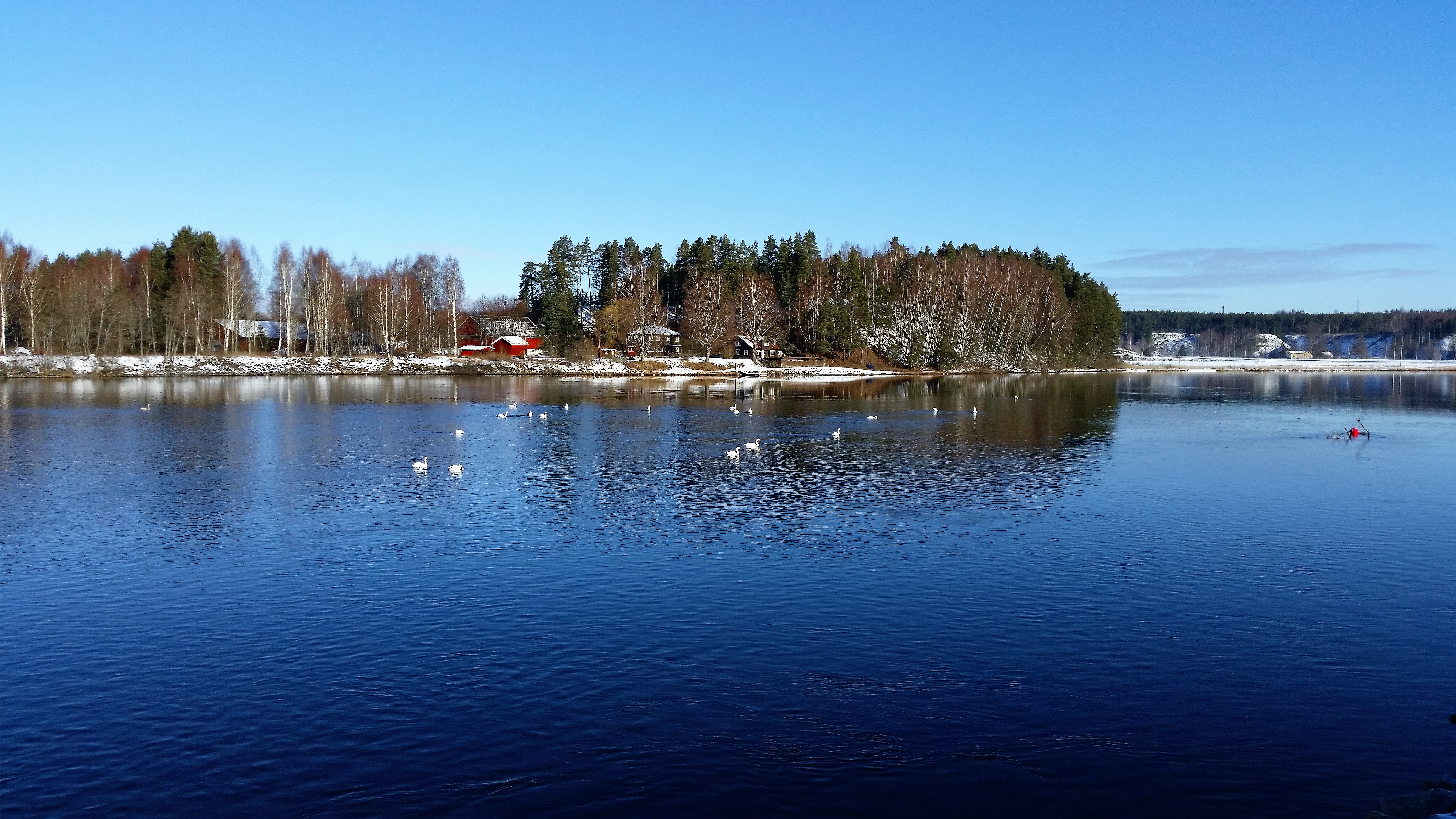 Busund gård ligger langs Storelva i Ringerike kommune